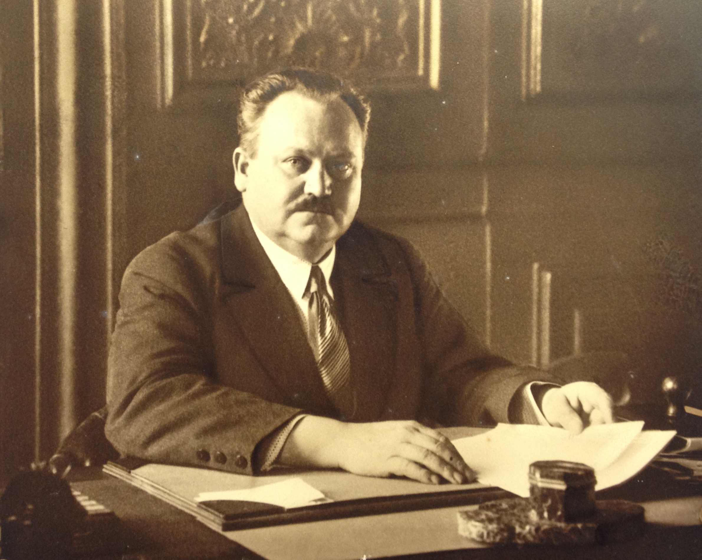 Archives départementales du Bas-Rhin, 32 Fi 19. Photographie de Charles Hueber.